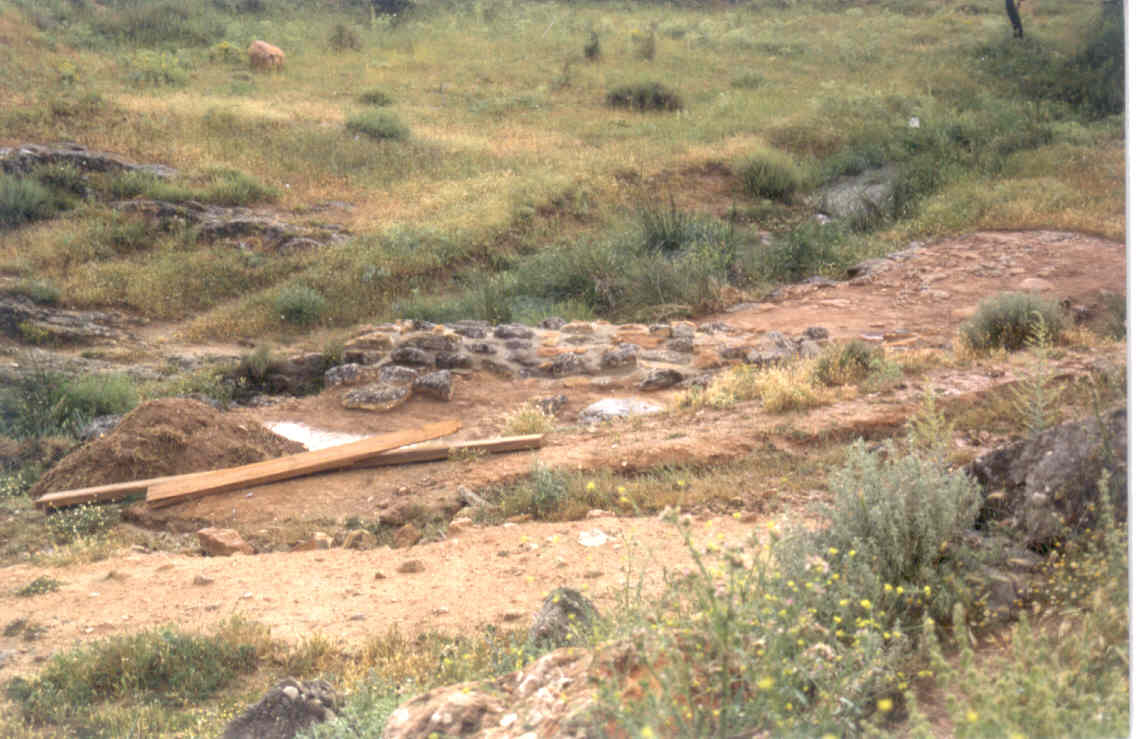 Calazada romana de Asturica Augusta a Tarraco por el Valle del Duero cerca de Uxama Argaela (El Burgo de Osma, Soria, España)